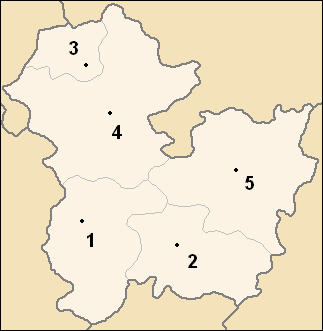 Carte des obchtini (municipalités) de l'oblast de Targovichte, en Bulgarie